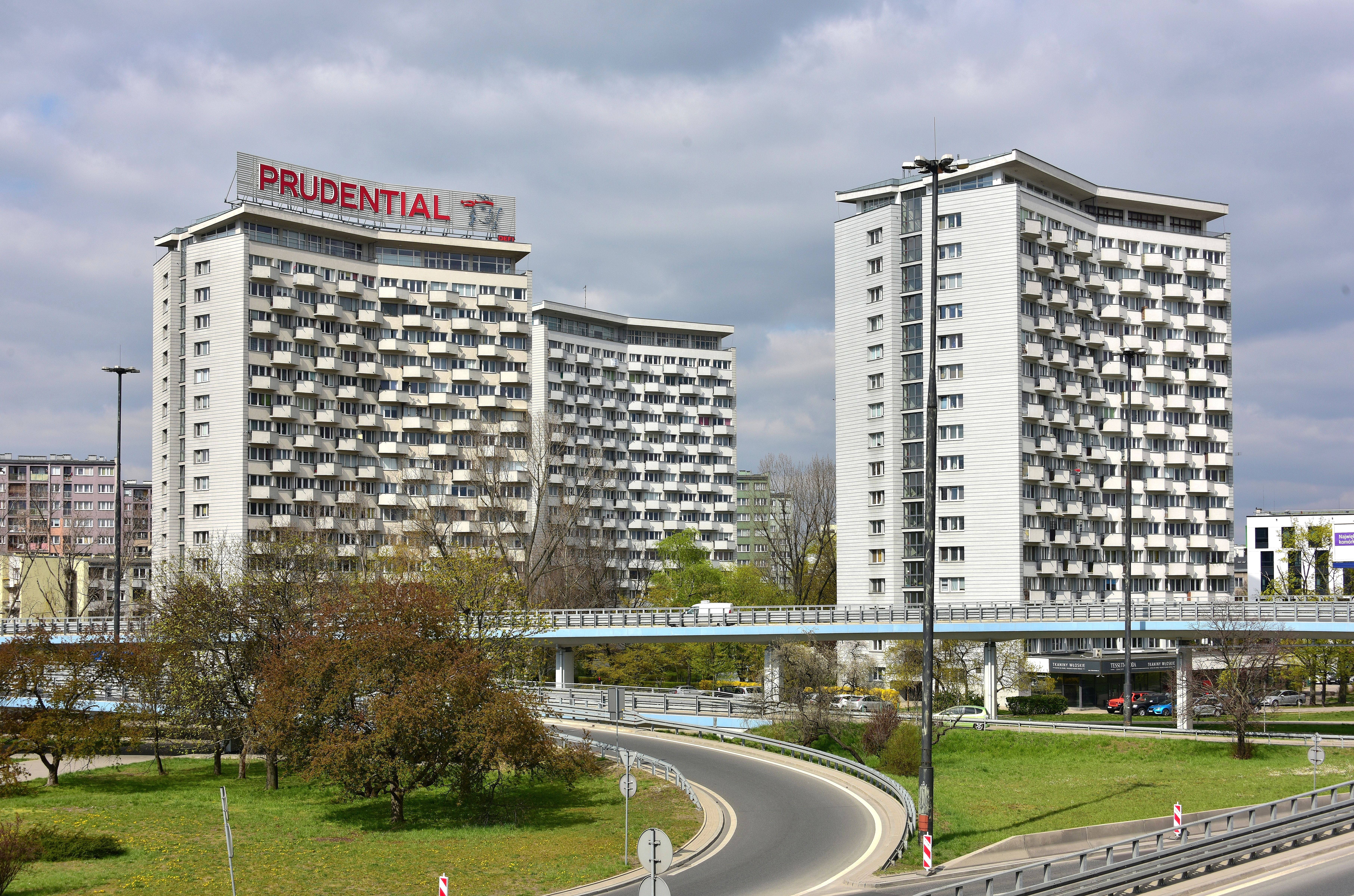 Budynki osiedla Torwar (tzw. Iksy) widziane z wiaduktu Trasy Łazienkowskiej